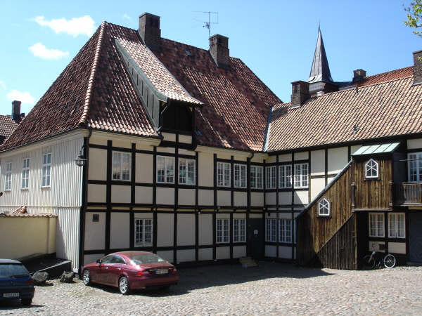 Henckelska gården, Helsingborg